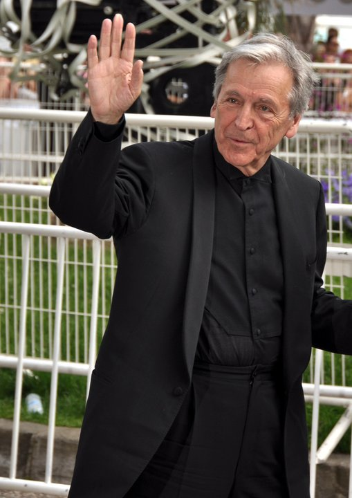 Costa-Gavras au festival de Cannes